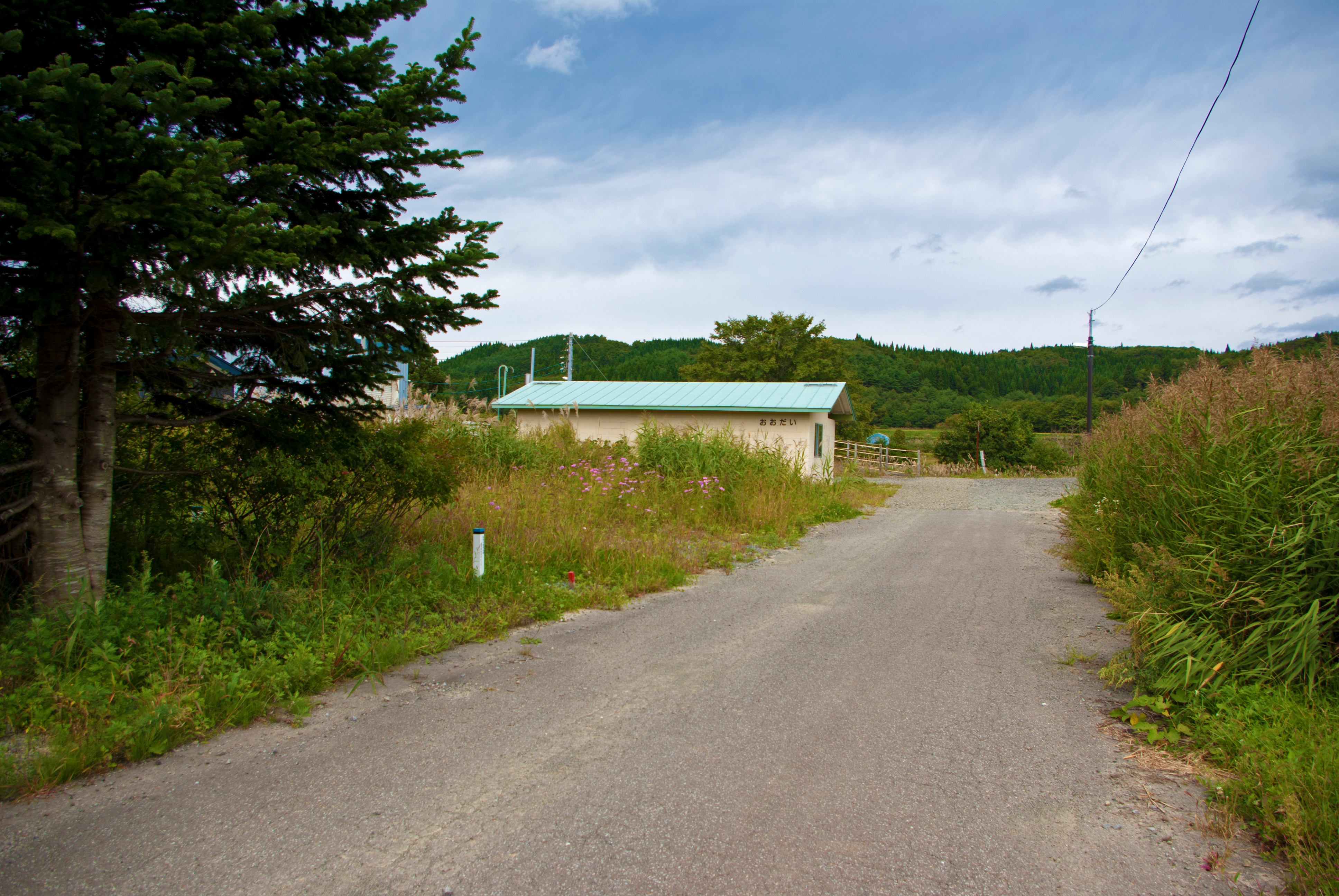 東日本旅客鉄道津軽線大平駅